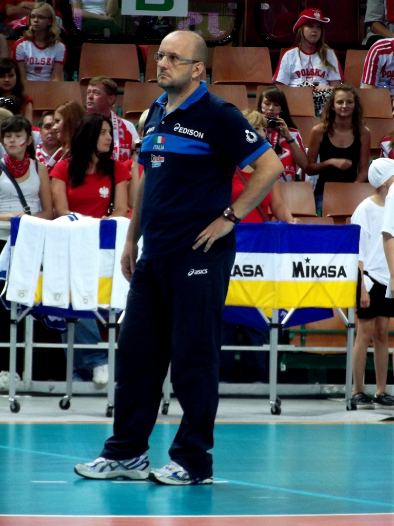 Zdjęcie zrobione podczas trzeciego dnia IX Memoriału im. Wagnera w katowickim Spodku.